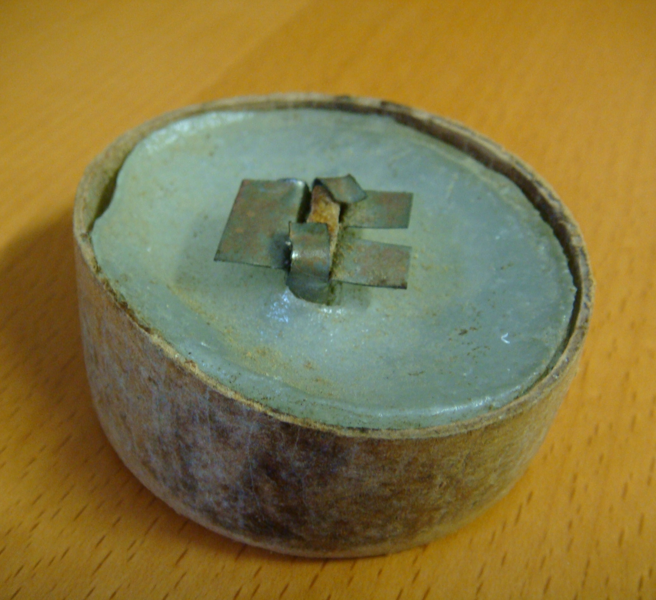 Hindenburglicht, um 1943-1945 (aus dem Museum Geiserschmiede Bühlertal). Hinweis: Der Docht steckt verkehrt herum im Wachs. Das hier sichtbare Metallteil dient dem flachen Docht an seinem unteren Ende als Halterung und ist deshalb aus dieser Blickrichtung normalerweise nicht sichtbar